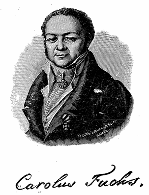 Портрет А. Ф. Фукса, воспроизведённый по клише, принадлежащему Н. Я. Агафонову, в книге: «Фукс К. Ф. Краткая история Казани. — Казань: Университетская типография, 1817 [1822].», изданной Казанским Обществом археологии, истории и этнографии в 1905 году.